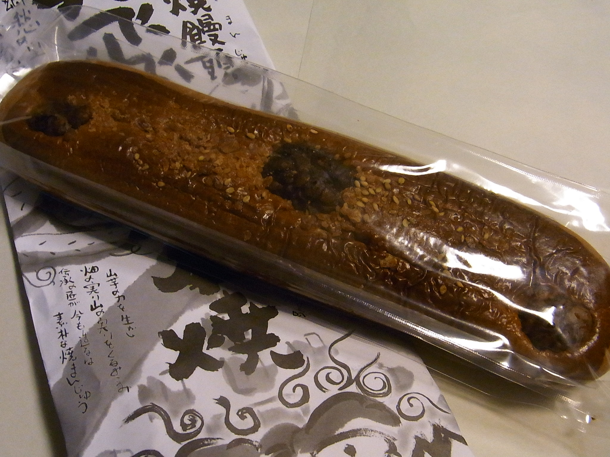 奥飛騨一本焼 くるみ焼饅頭